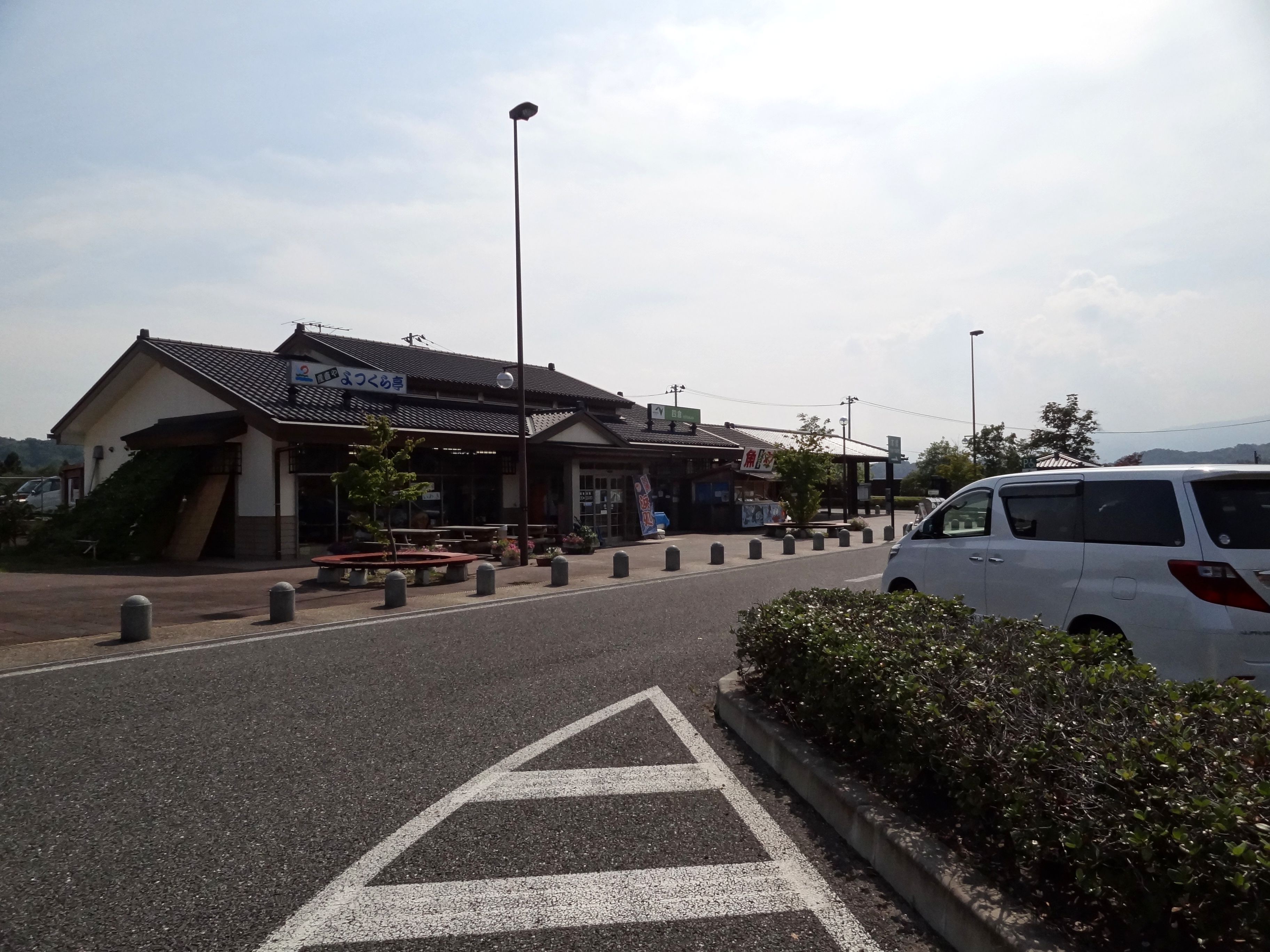 常磐自動車道 四倉パーキングエリア（上り線）